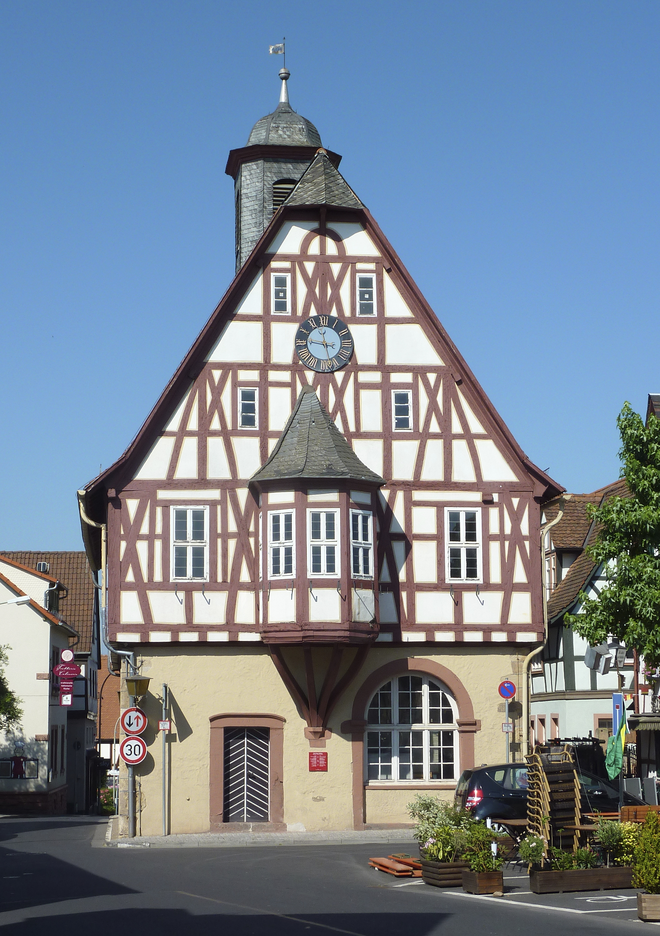 Frankfurt am Main, Stadtteil Bergen-Enkheim: Das historische Rathaus von Bergen, Ostfassade